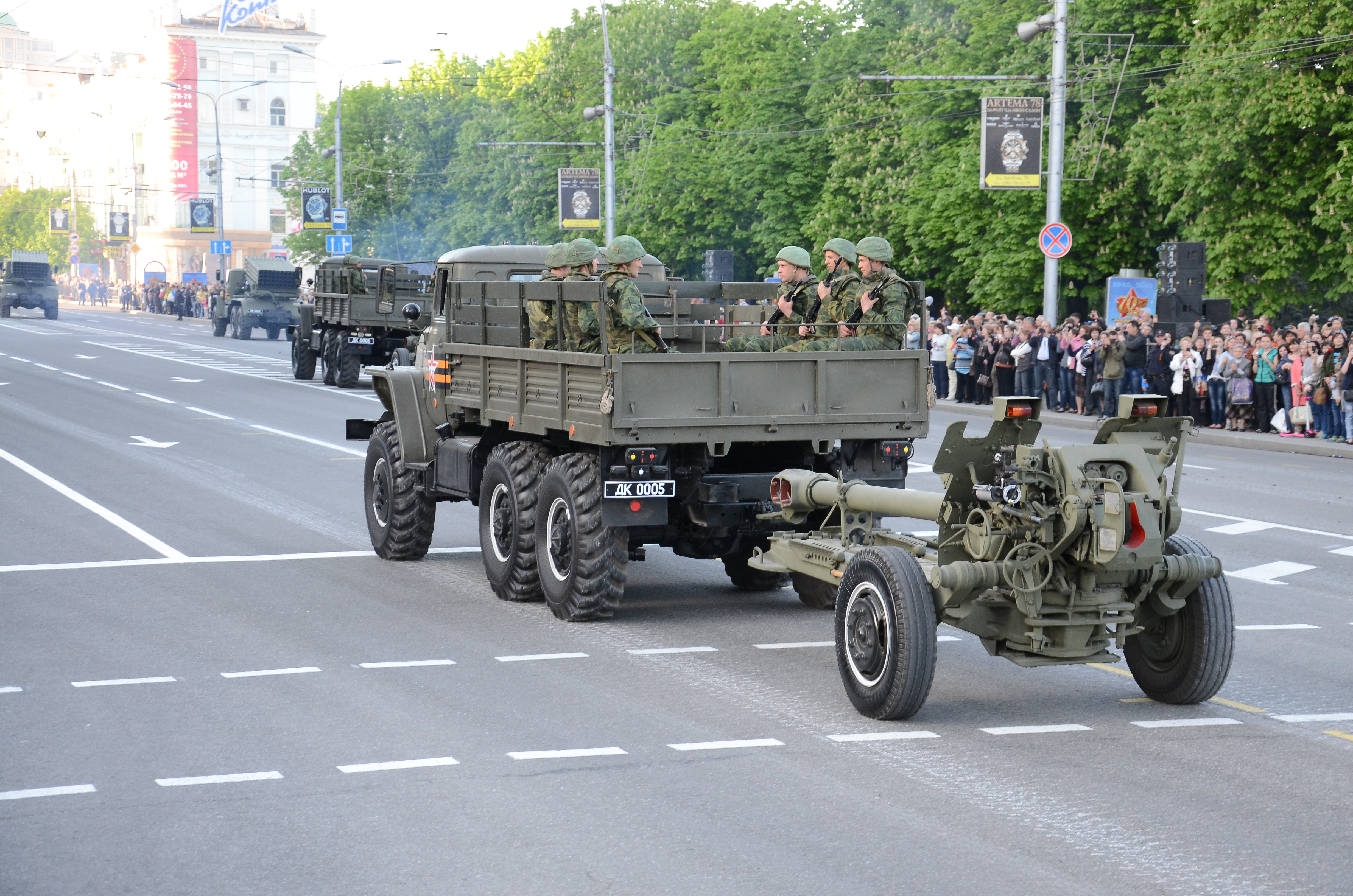 Репетиция парада в честь дня Победы в Донецке